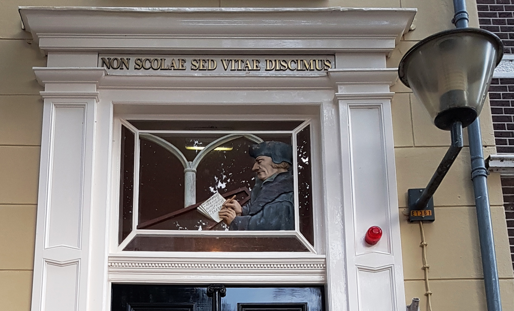 Dit snijwerk dat Desiderius Erasmus uitbeeldt bevindt zich in het bovenlicht boven de entree van de voormalige Latijnse School te Deventer aan het Grote Kerkhof. Het werd in 1992 bij de renovatie van het pand geplaatst en is van de hand van Ela Venbroek-Franczyk. Erasmus was leerling aan deze school.